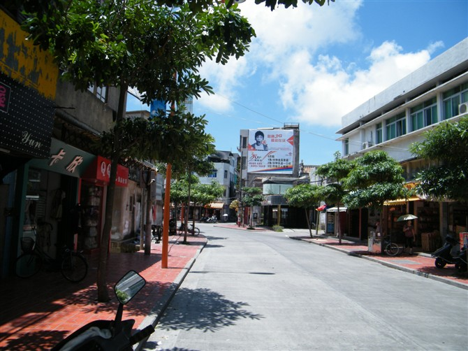 红桥路 ，视角为由北向南。